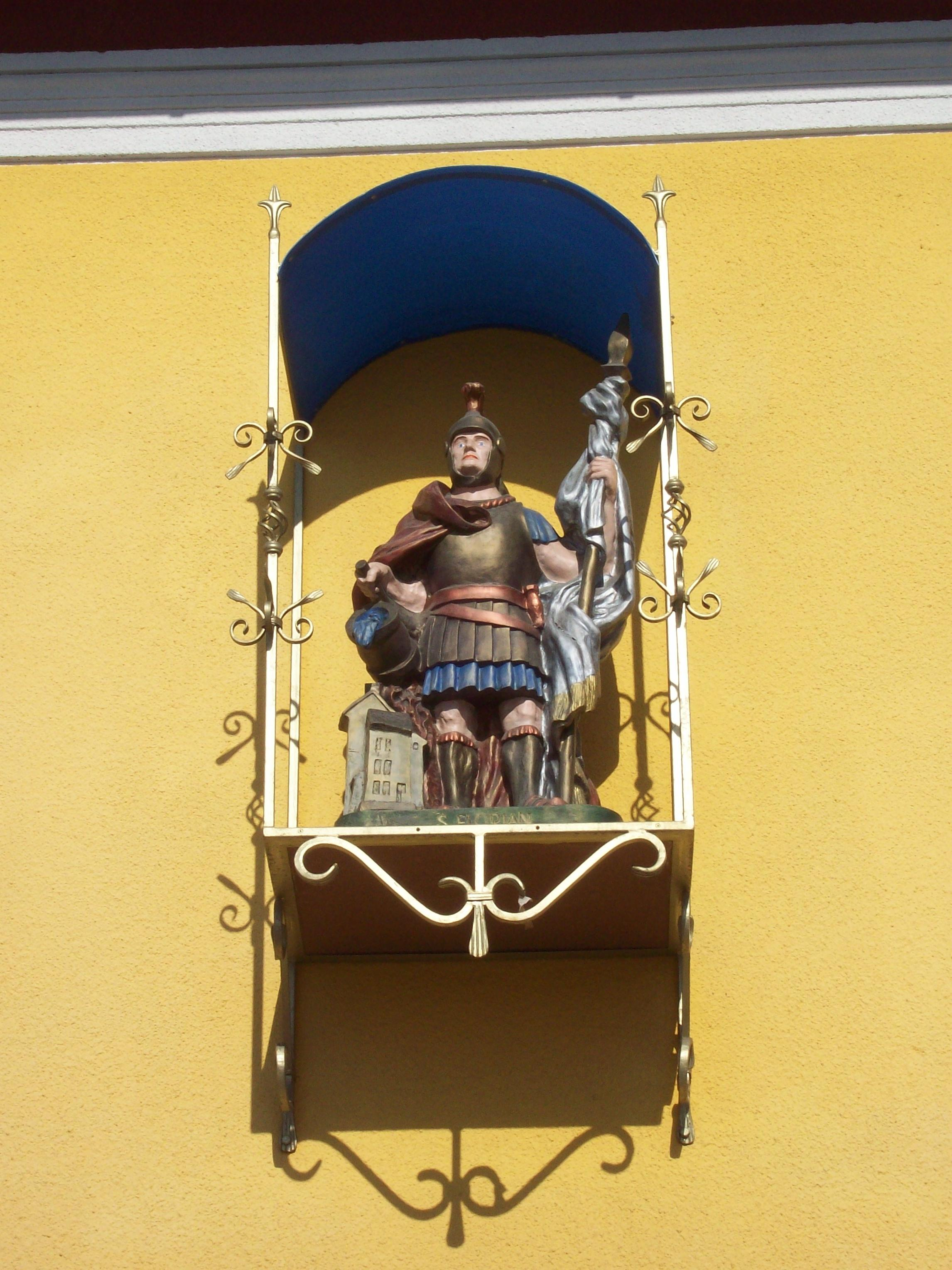 OSP w Sulejowie. Pomnik patrona.